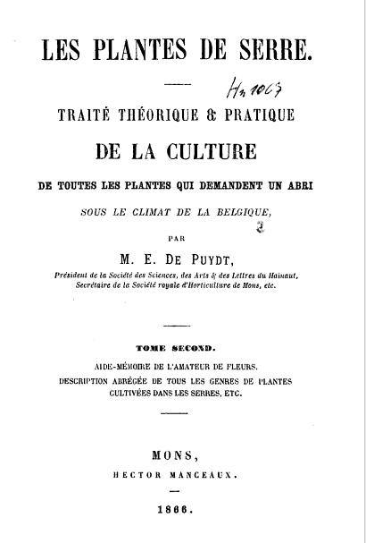 Page de grand titre de Les plantes de serre : traité théorique et pratique de la culture de toutes les plantes qui demandent un abri sous le climat de la Belgique par Paul-Émile de Puydt, Mons, H. Manceaux, tome second, 1860.